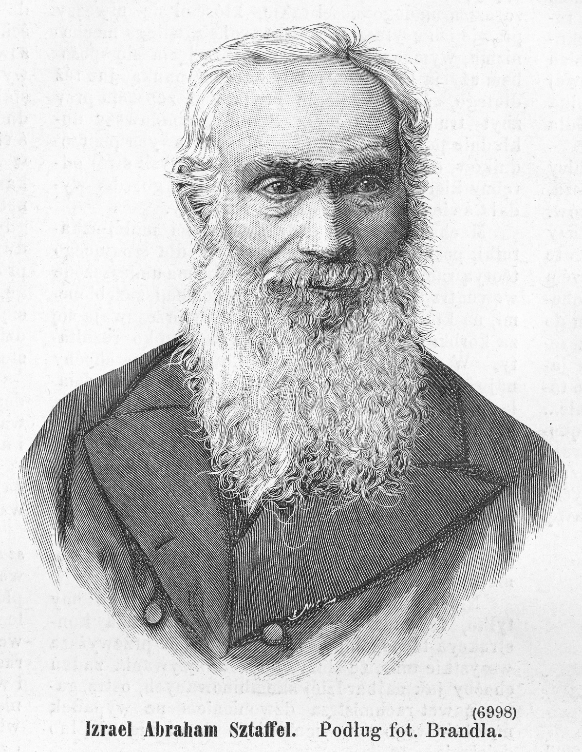 Izrael Abraham Sztaffel [właśc. Staffel] : Podług fot. Brandla